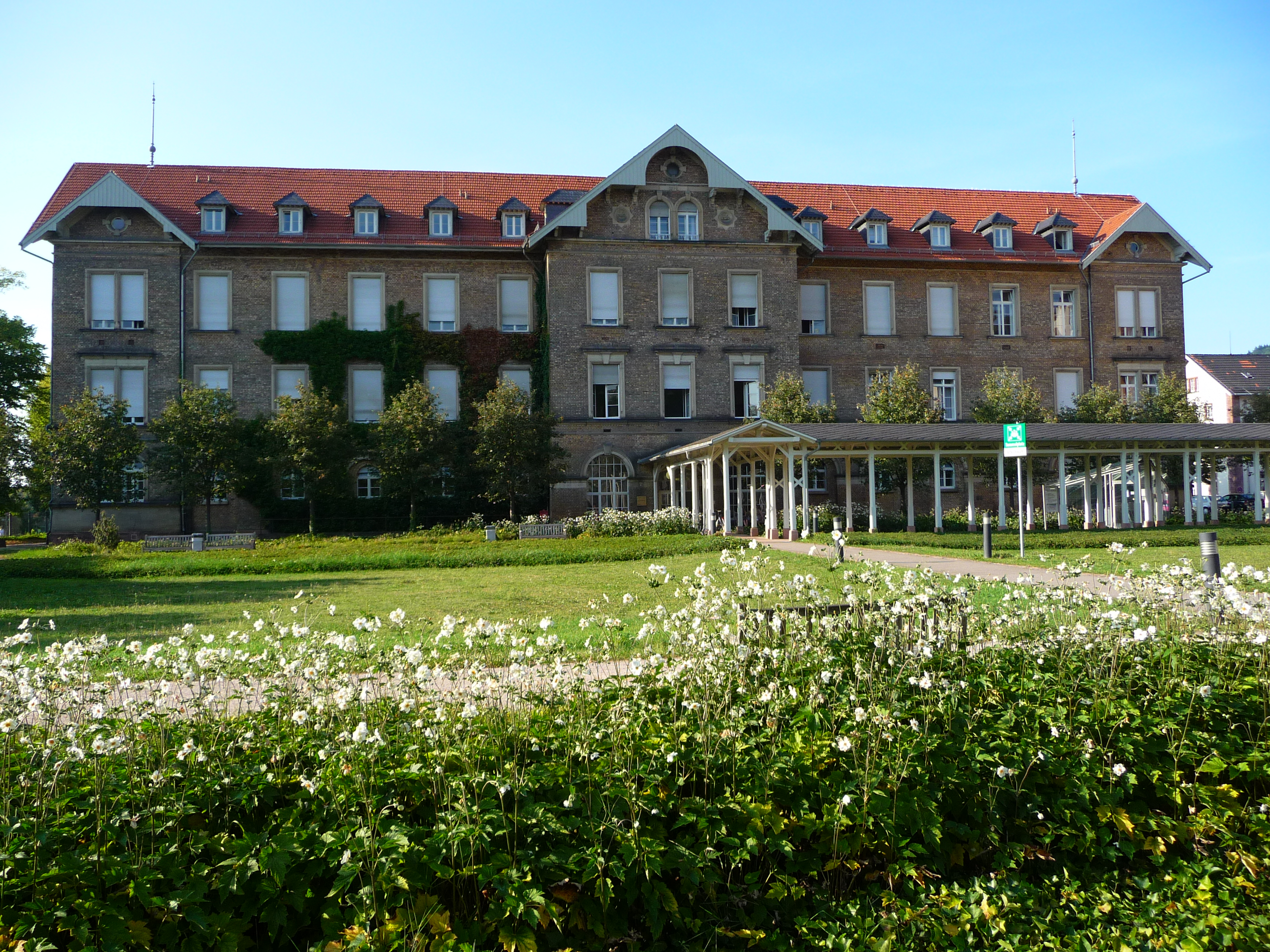 Psychiatrische Klinik (Voßstraße 2) des Heidelberger Universitätsklinikums im Stadtteil Bergheim [1] (Deutschland)